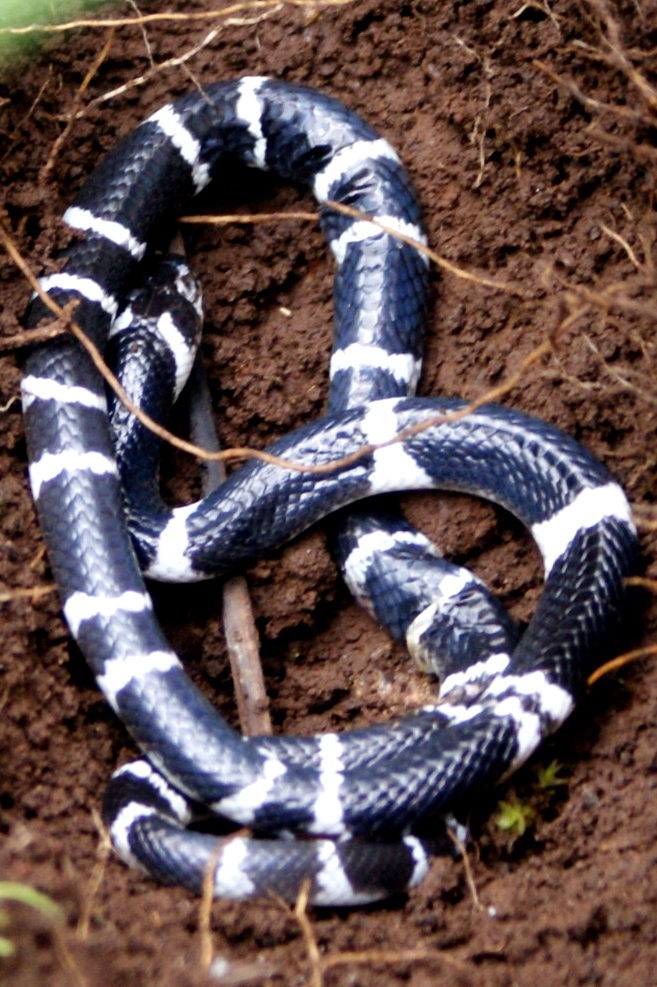 Common Krait